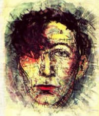 Autoritratto 1918.